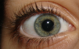 Grönt öga för wikipedialänken GRÖNA ÖGON.